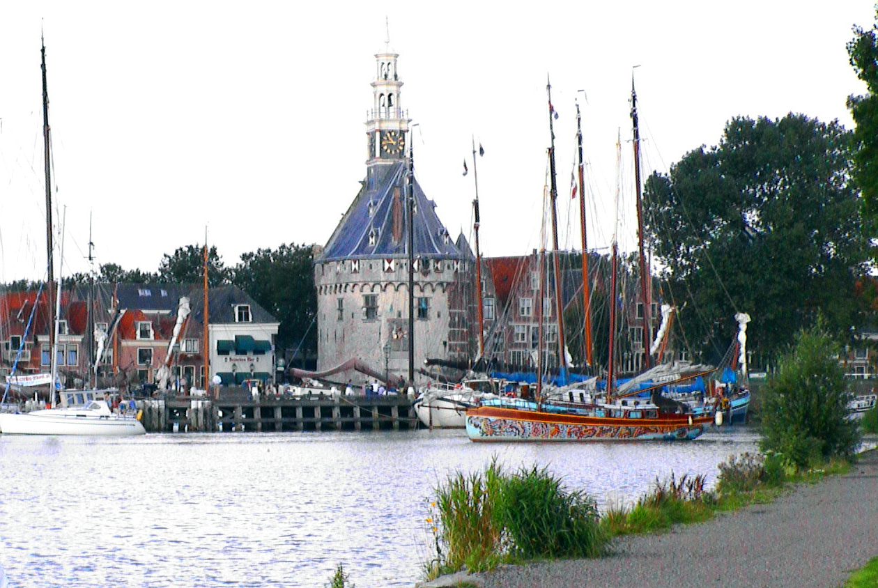 Makkum en 2002